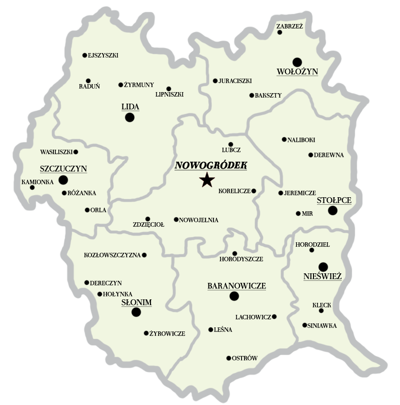 Mapa Województwa nowogródzkiego